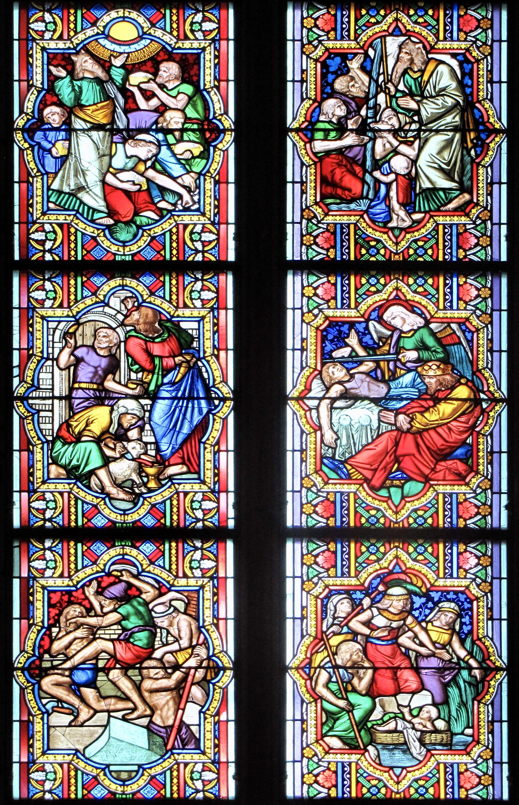 Kölner Dom: Geschichte des Volkes Gottes. Fenster aus der nördlichen Turmhalle, Teil des Johannes-Klein-Zyklus. Erzählung der Geschichte des Volkes Israels beginnend mit der Auffindung Mose (unten rechts). 1884 von Johannes Evangelist Klein entworfen.